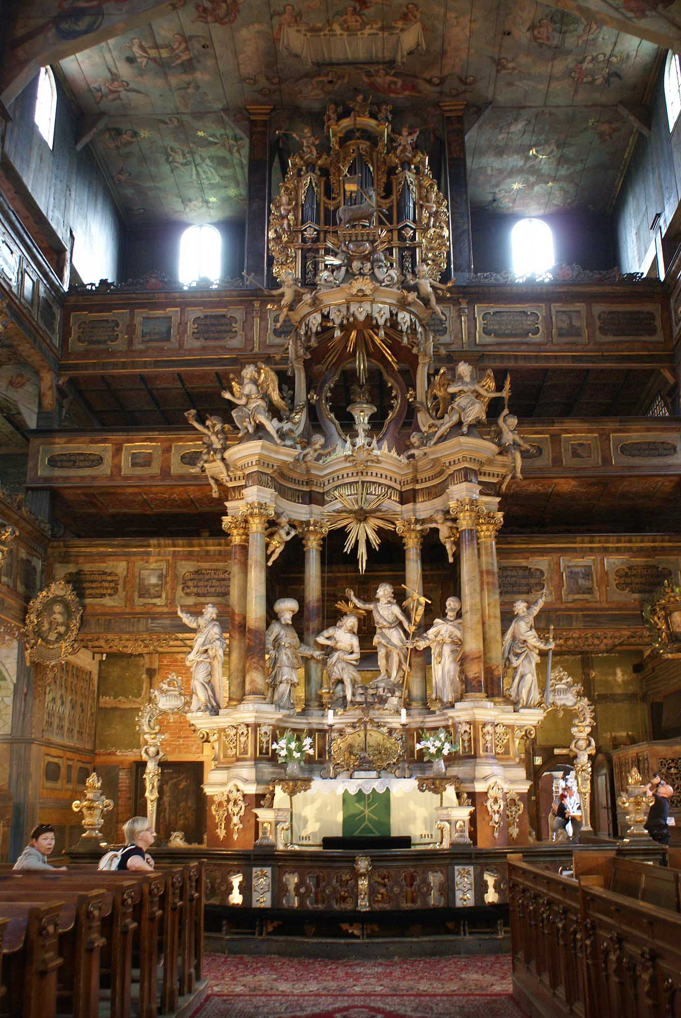 Świdnica, kościół ewangelicki (Pokoju), poł. XVII, XVIII